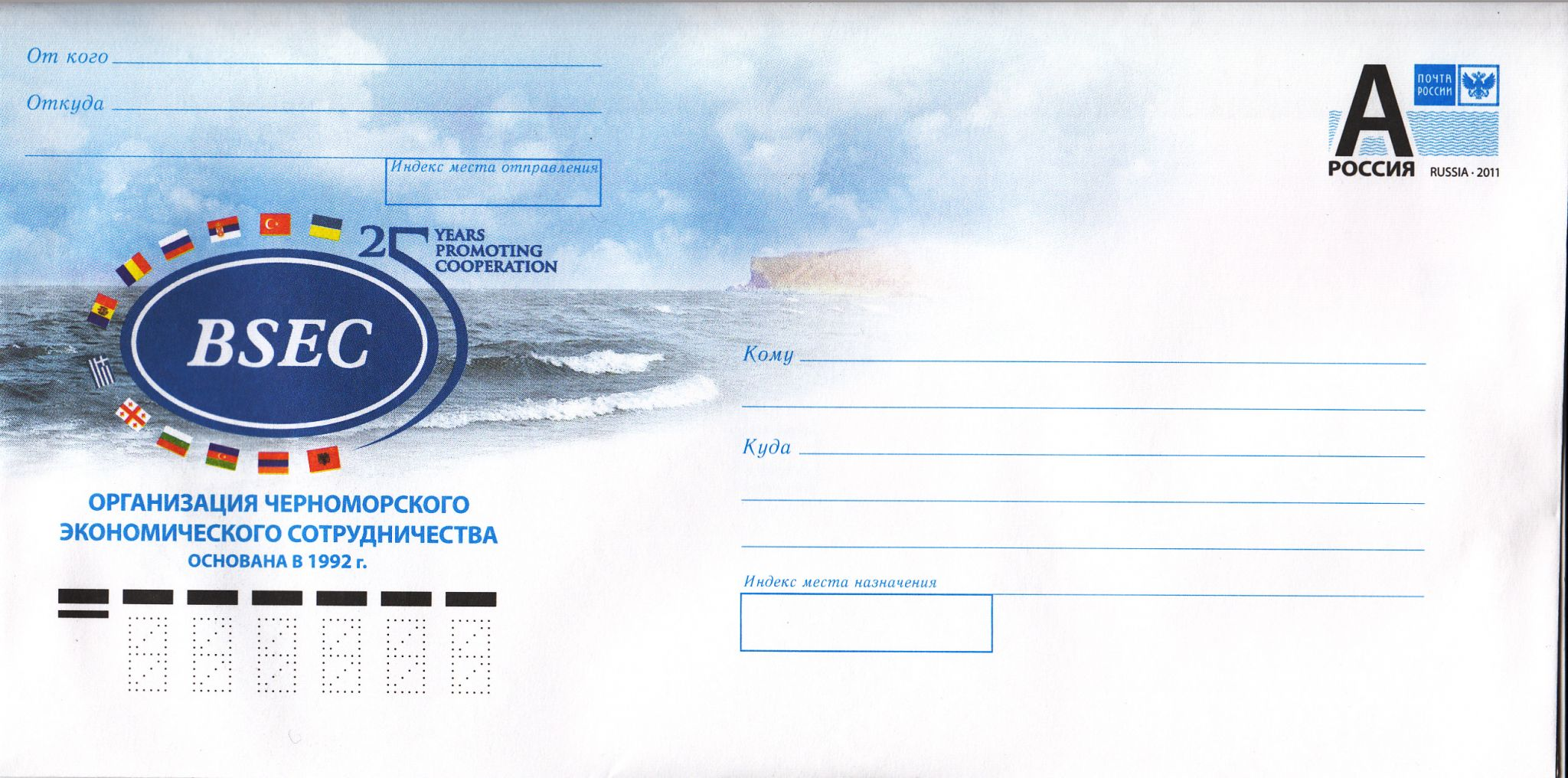 BSEC 25 почтовый конверт Россия